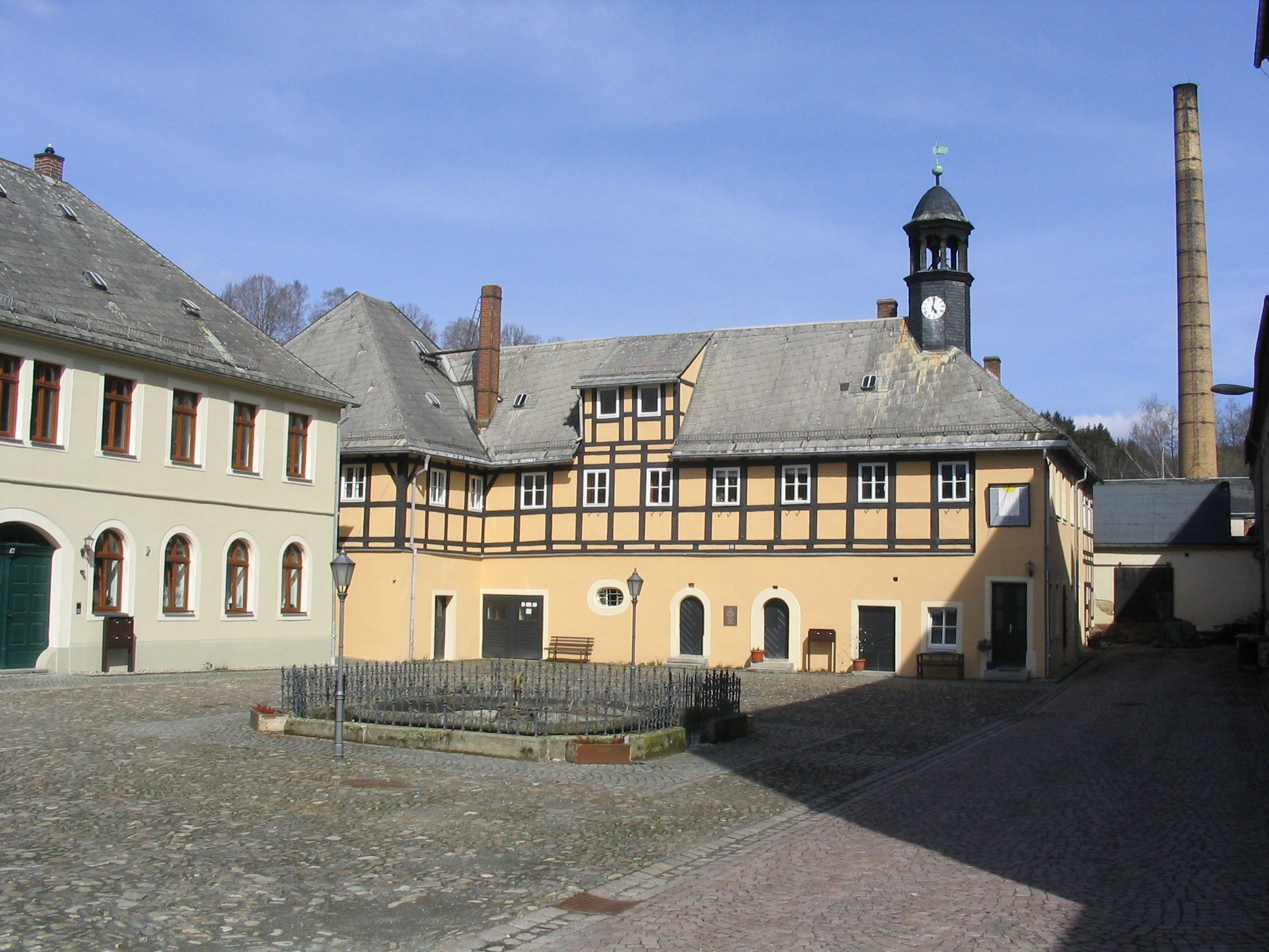 Blaufarbenwerk Zschopenthal, links im Bild das Herrenhaus, Blick zum Turmhaus, Aufgenommen am 15.04.2006 von Dr. Hagen Graebner